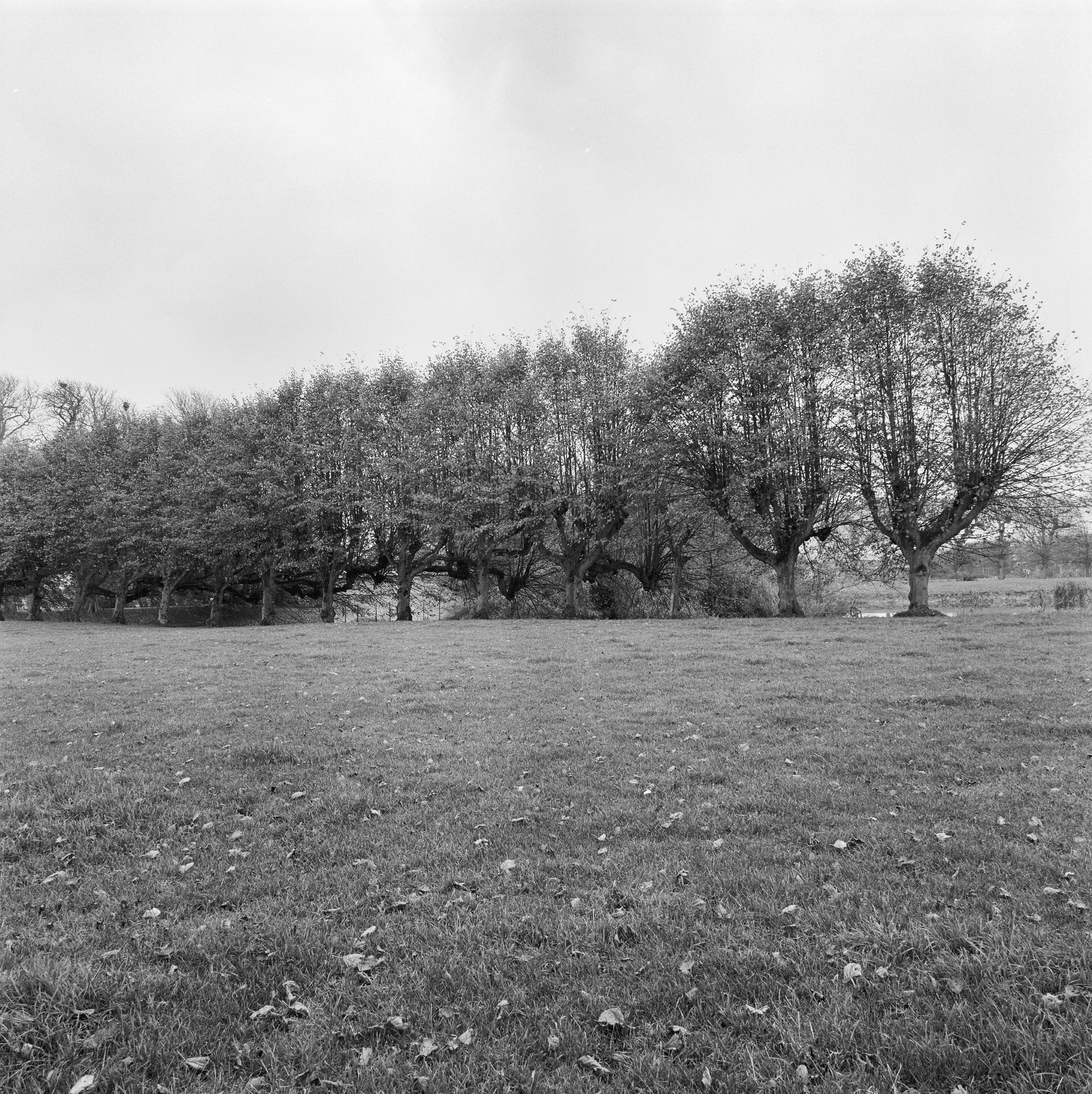 BORG "EWSUM": Exterieur OVERZICHT, HOUTSINGEL LANGS GRACHT